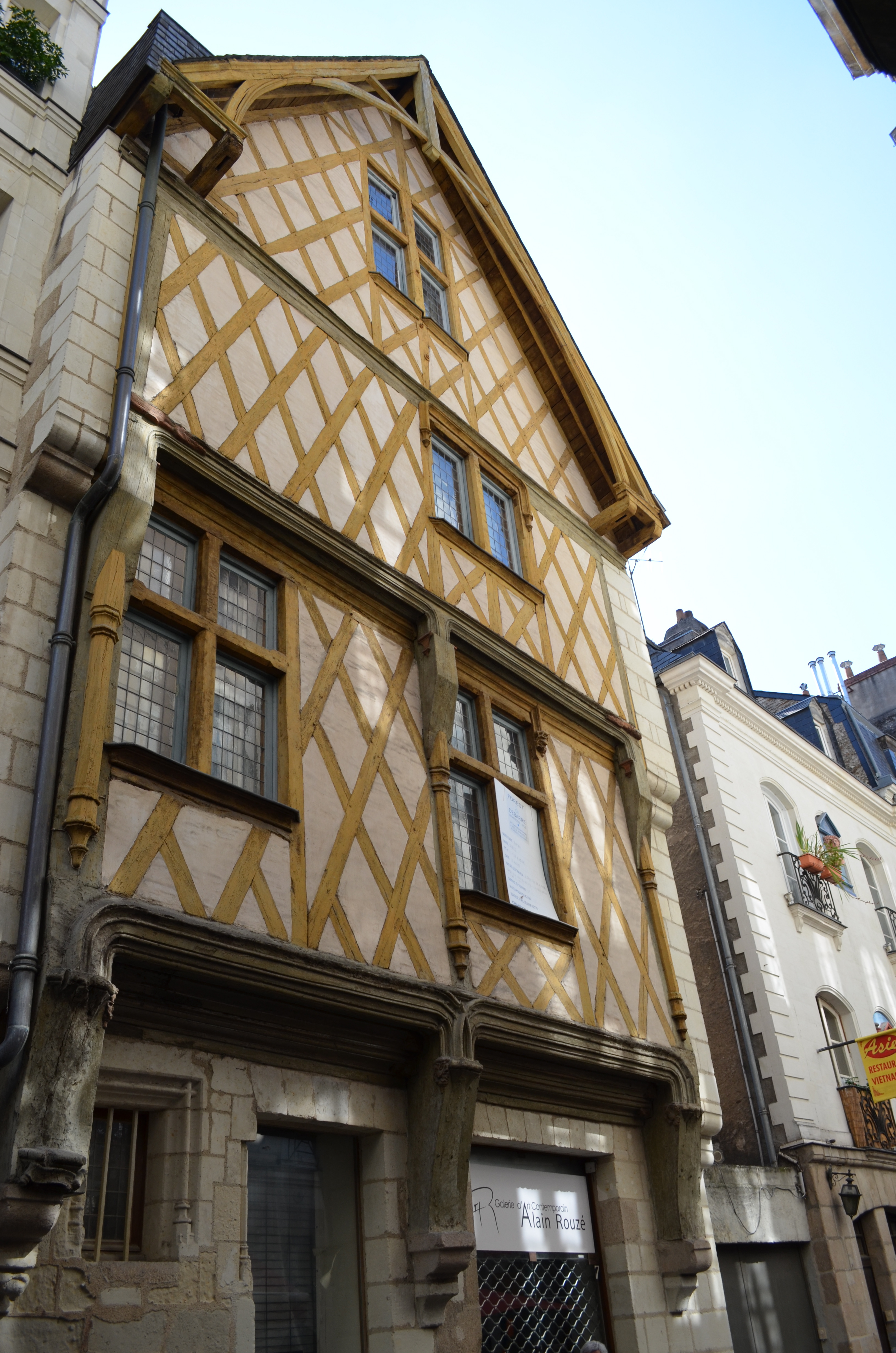 Maison du 15è s. - 7 rue de la Juiverie, Nantes .